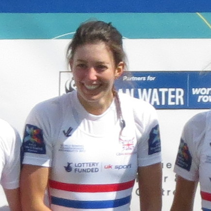 Podium LW4x GER : THOMA, Katrin PIEPER, Leonie MUELLER, Lena NOSKE, Anja GBR STUBBS, Brianna WALCZAK, Ruth CRAIG, Emily PIGGOTT, Eleanor NED SCHONK, Anne Marie KRAAIJKAMP, Mirte WOERNER, Elisabeth FRENKEN, Marie-Anne